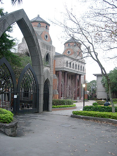 真理大學正門與大禮拜堂。